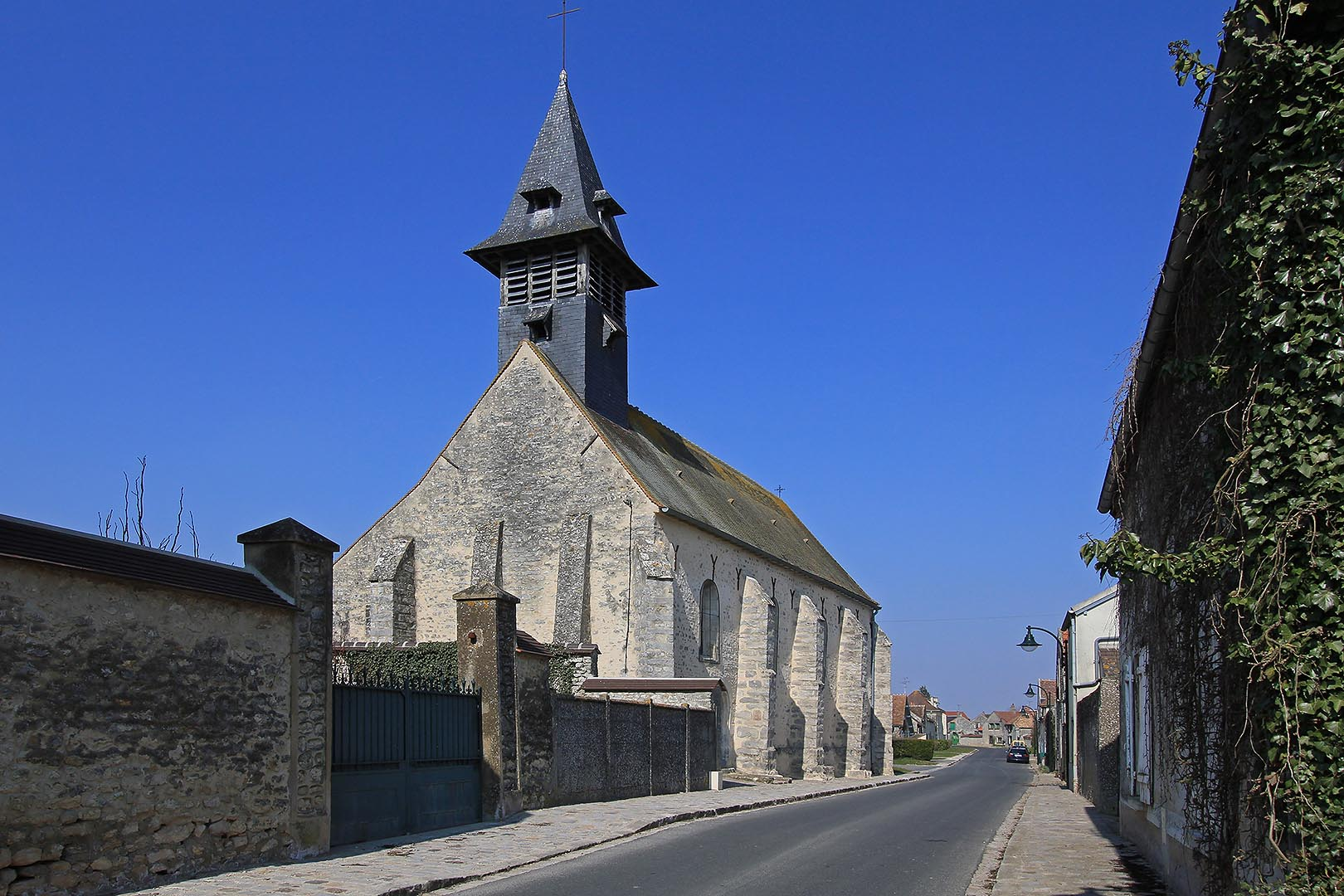 église de La Forêt Sainte Croix